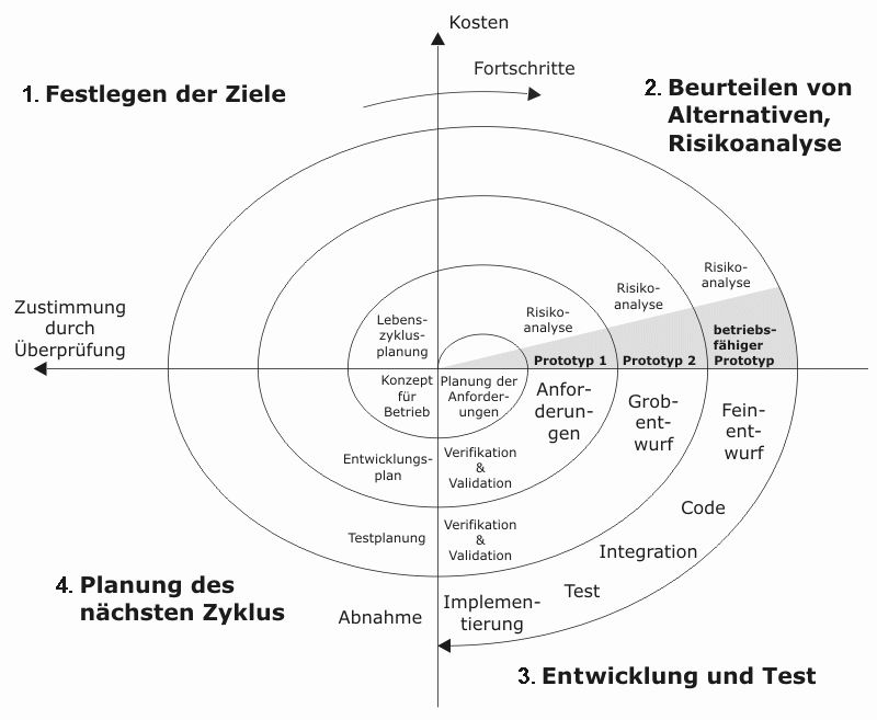 Spiralmodell nach Boehm (1988)